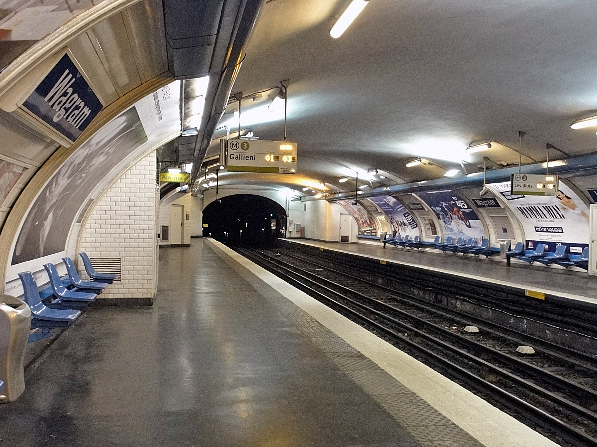 Joseph-André Motte (Français, 1925-2013): siège "Motte", RATP 1973, coque en tôle 10/20 emboutie et émaillée sur rails métalliques, station Wagram de la ligne 3 du métro de Paris, France.